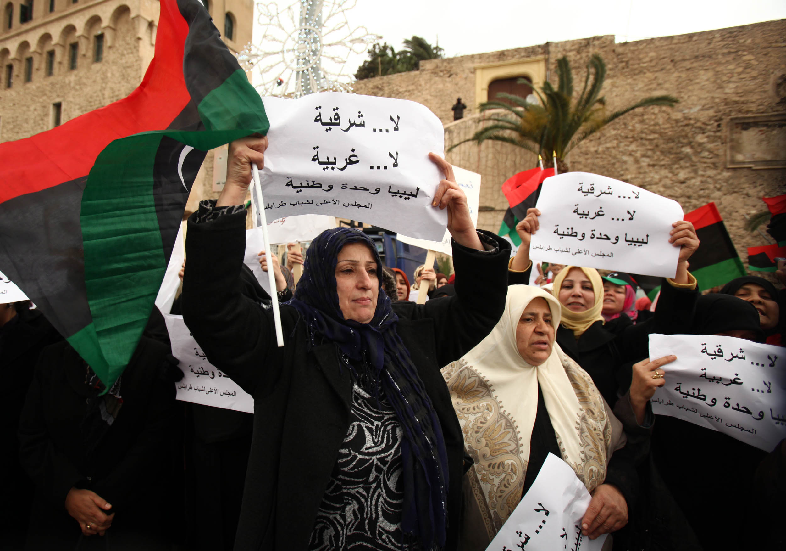 Protestors in Tripoli denounce calls to divide the country into three autonomous regions. متظاهرون في طرابلس يدينون الدعوة إلى تقسيم البلاد إلى ثلاث مناطق تتمتع بالحكم الذاتي. Les manifestants de Tripoli dénoncent les appels à la division du pays en trois régions autonomes.